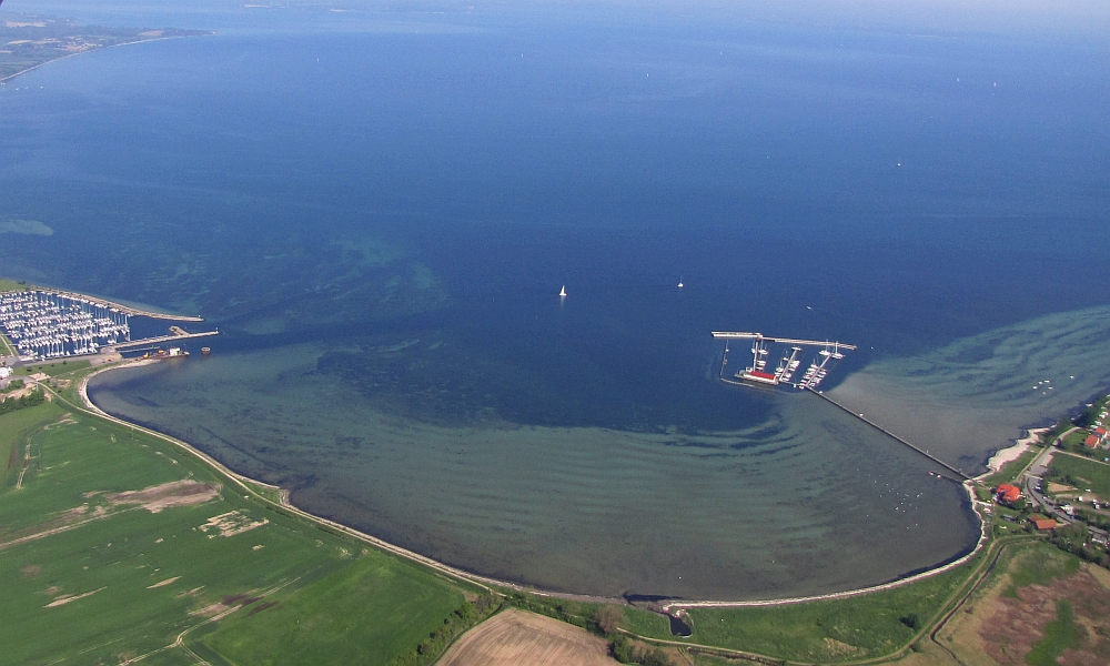 Luftbild der Geltinger Bucht von Süden, oben im Bild die Flensburger Förde, unten links Gelting-Mole, unten rechts Wackerballig bzw Gammellück; obere Ecke links die Landzunge bei Habernis - Foto Wolfgang Pehlemann Steinberg Ostsee